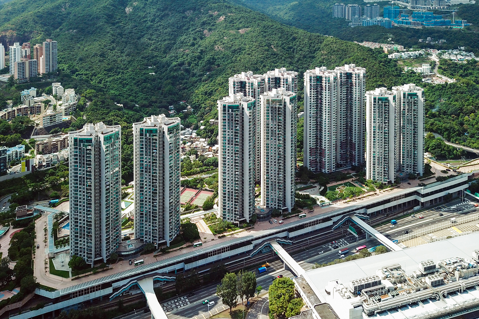 Plaza Ascot